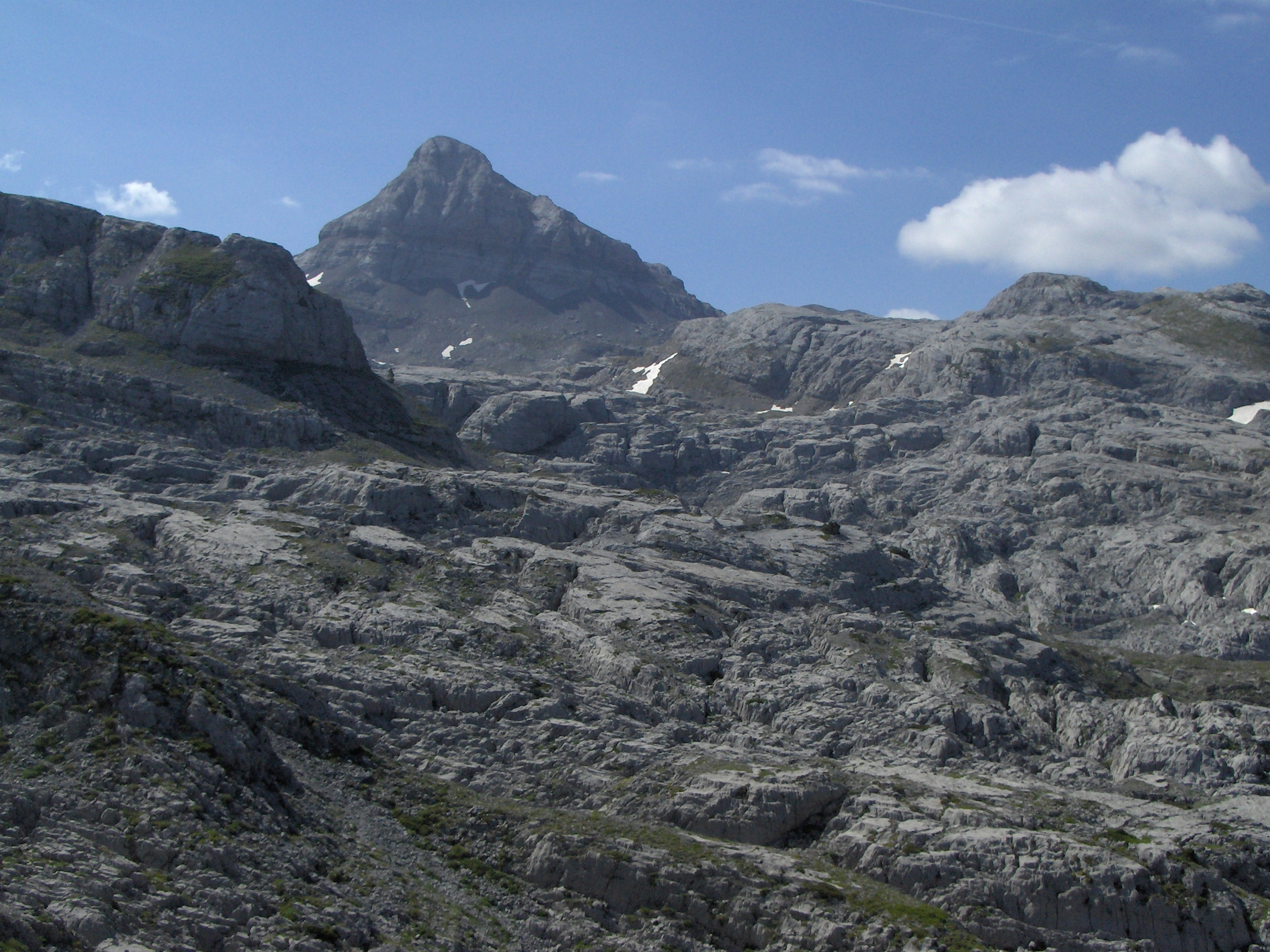 Le lapiaz de la Pierre Saint Martin situé au pied du Pic d'Anie 2504 m